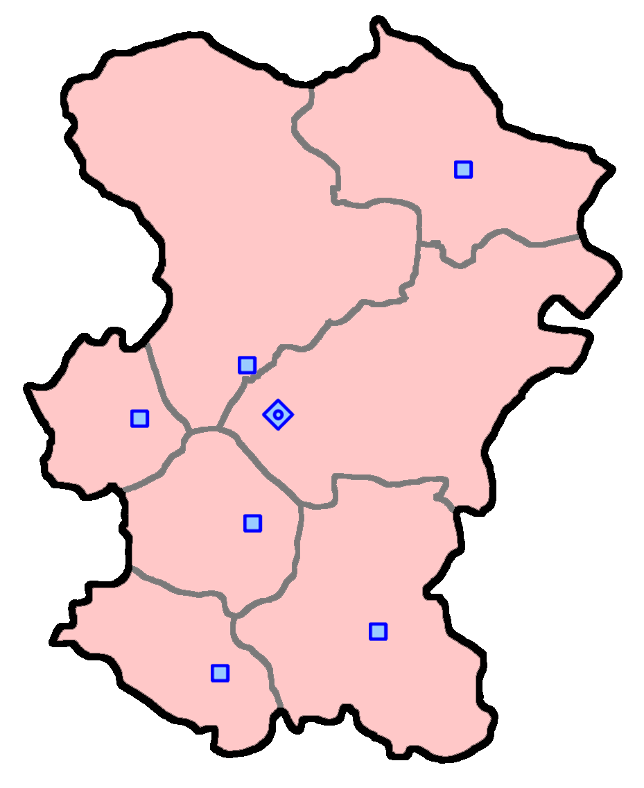 حوزه‌های انتخاباتی مجلس شورای اسلامی در استان همدان